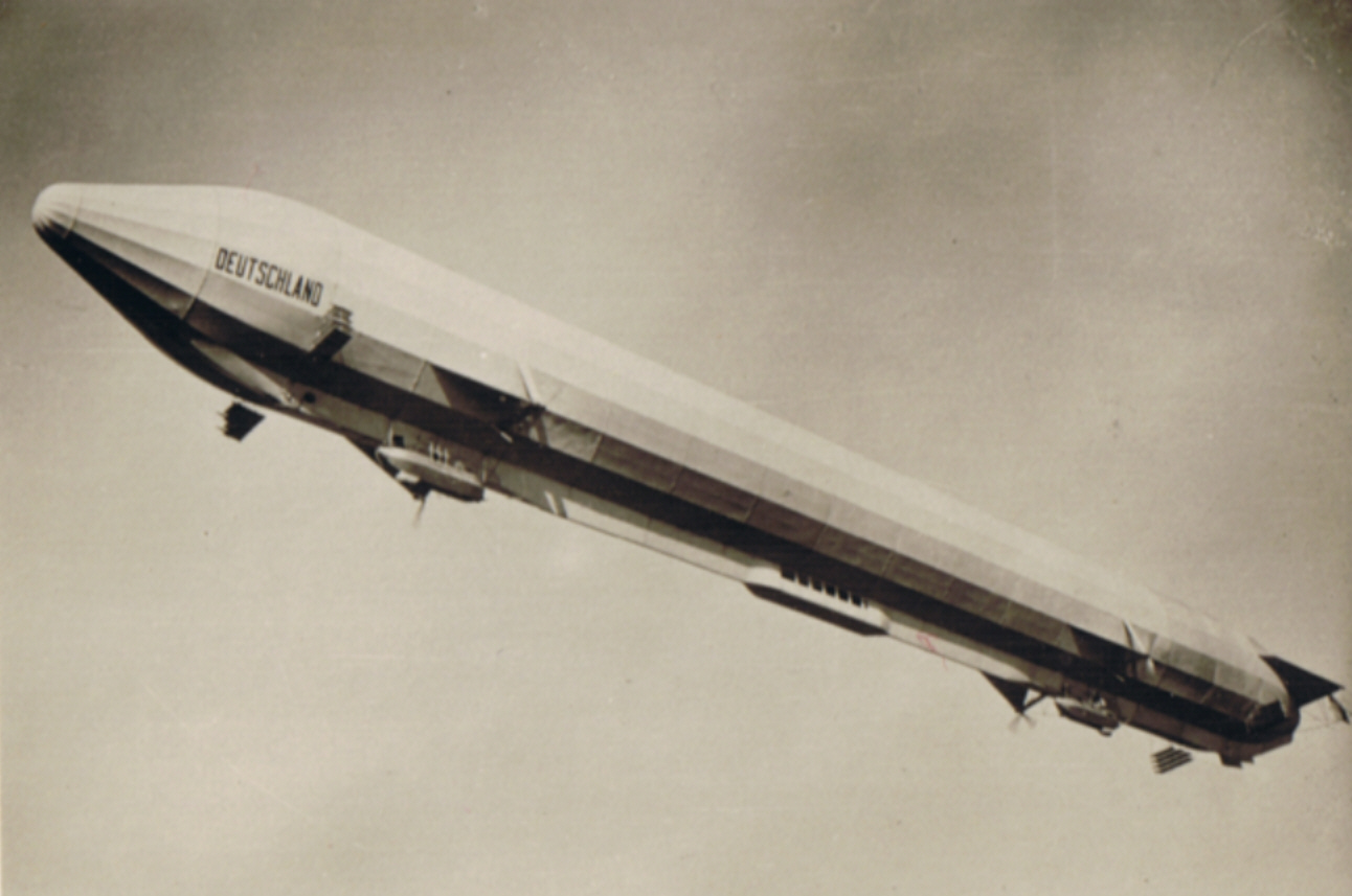 LZ 8 Deutschland II in Fahrt